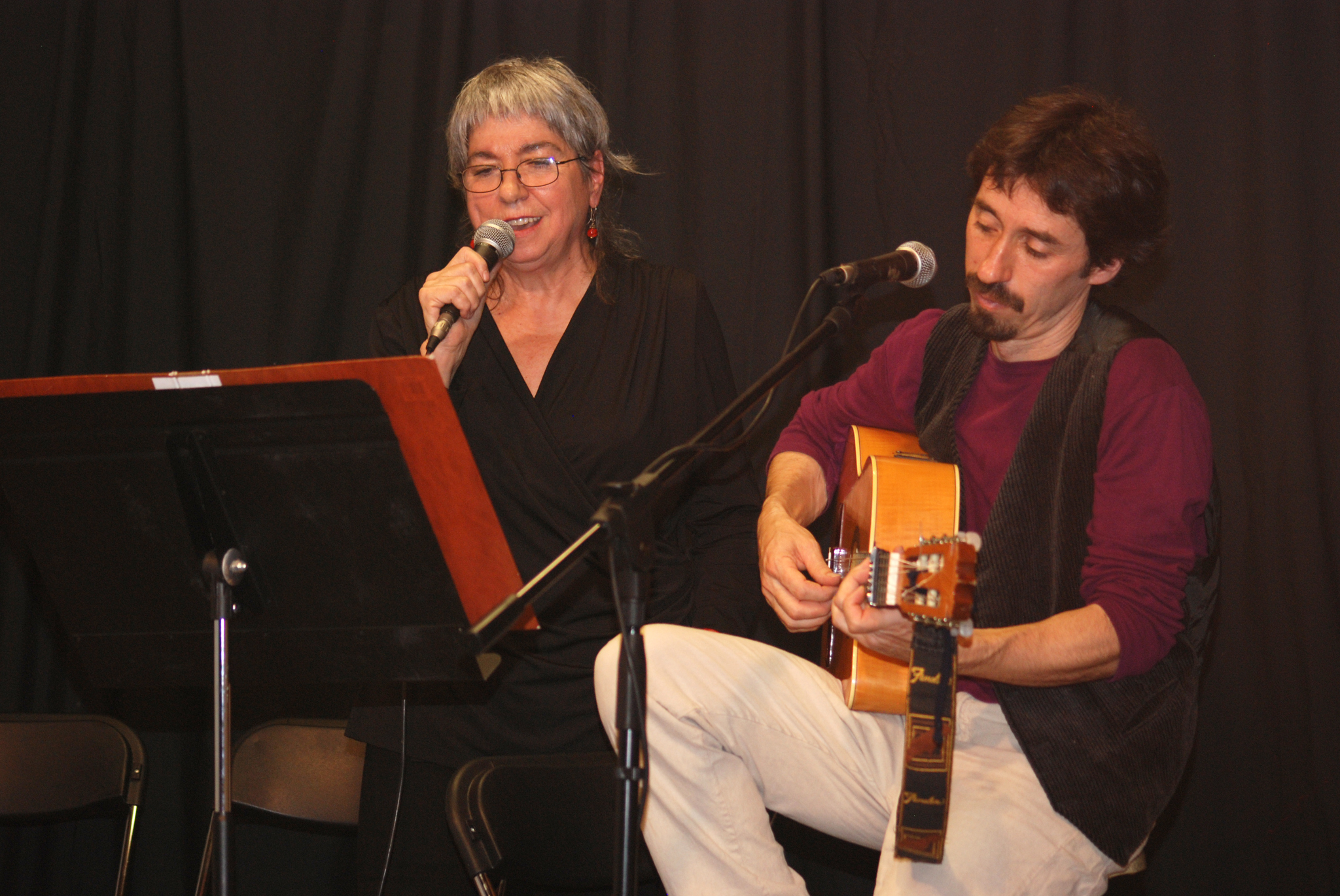 2012ko udazkeneko kontzertuan tags: euskalherria gipuzkoa musika gitarra oiartzun amaiazubiria ahotsa herrimusika edortaamurua kordofonoak Soinuenea - Herri Musikaren Txokoa (Traditional Music Centre; former Documentation Center of Popular Music) Oiartzun, Gipuzkoa, Spain